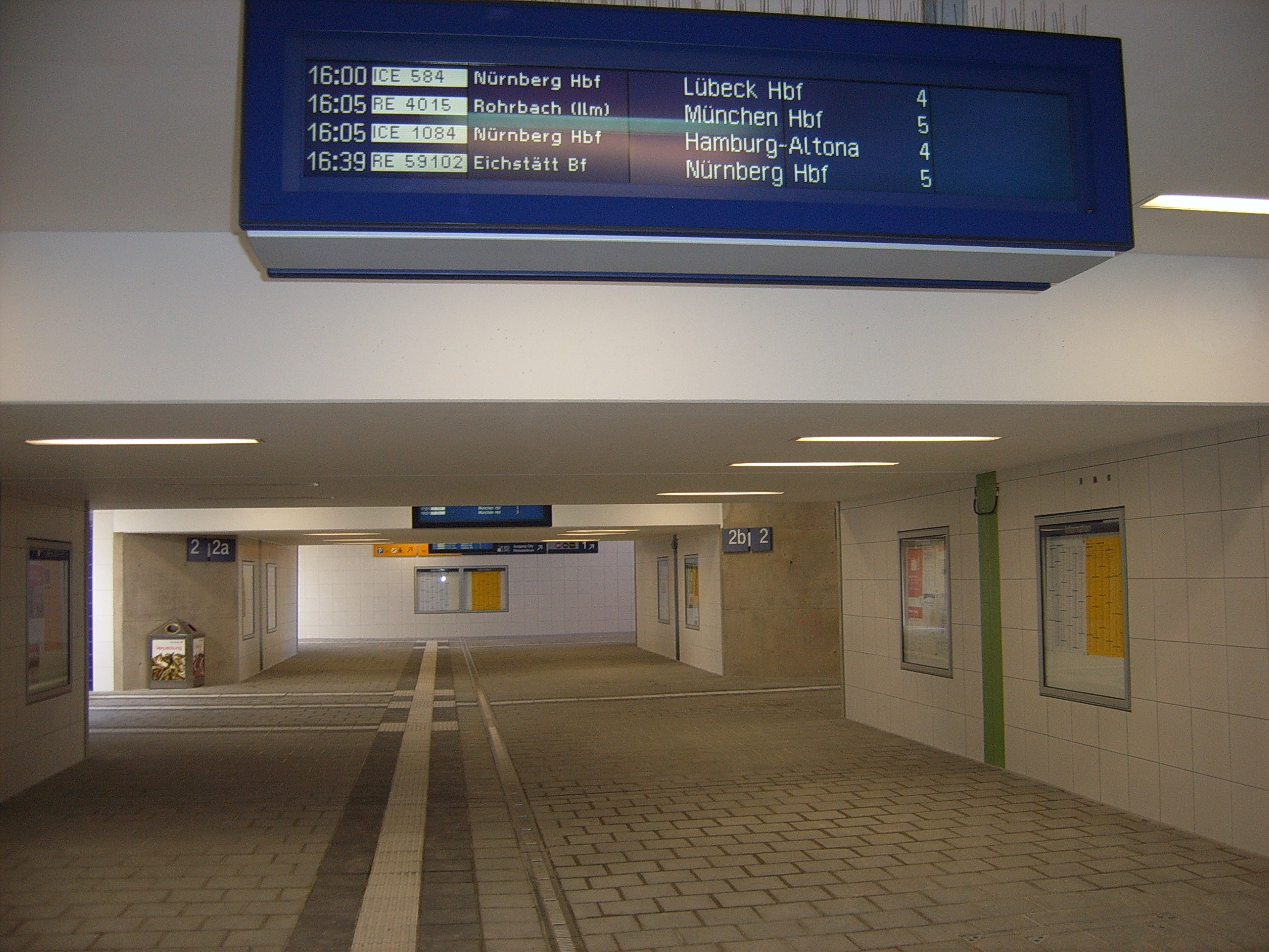 Das Foto zeigt die neue Bahnsteigunterführung des Ingolstädter Hauptbahnhofs.